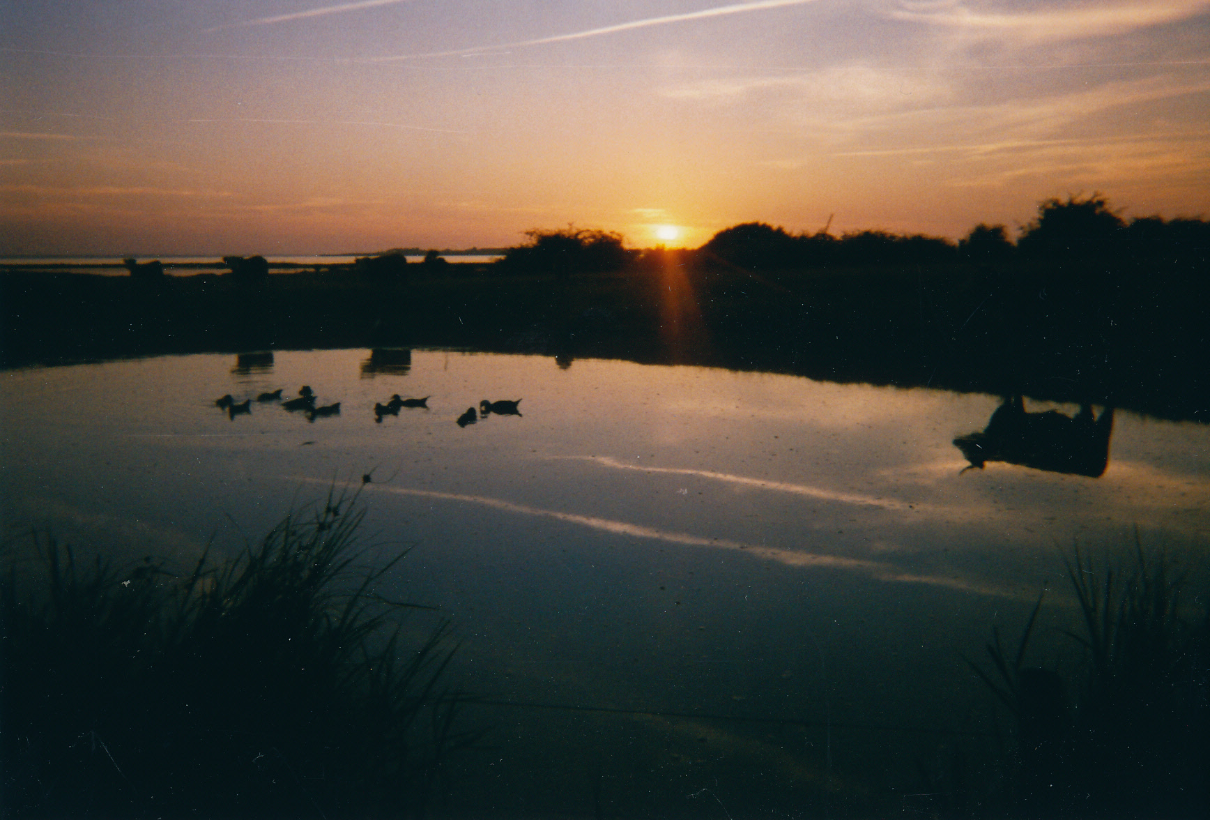 Avernakø